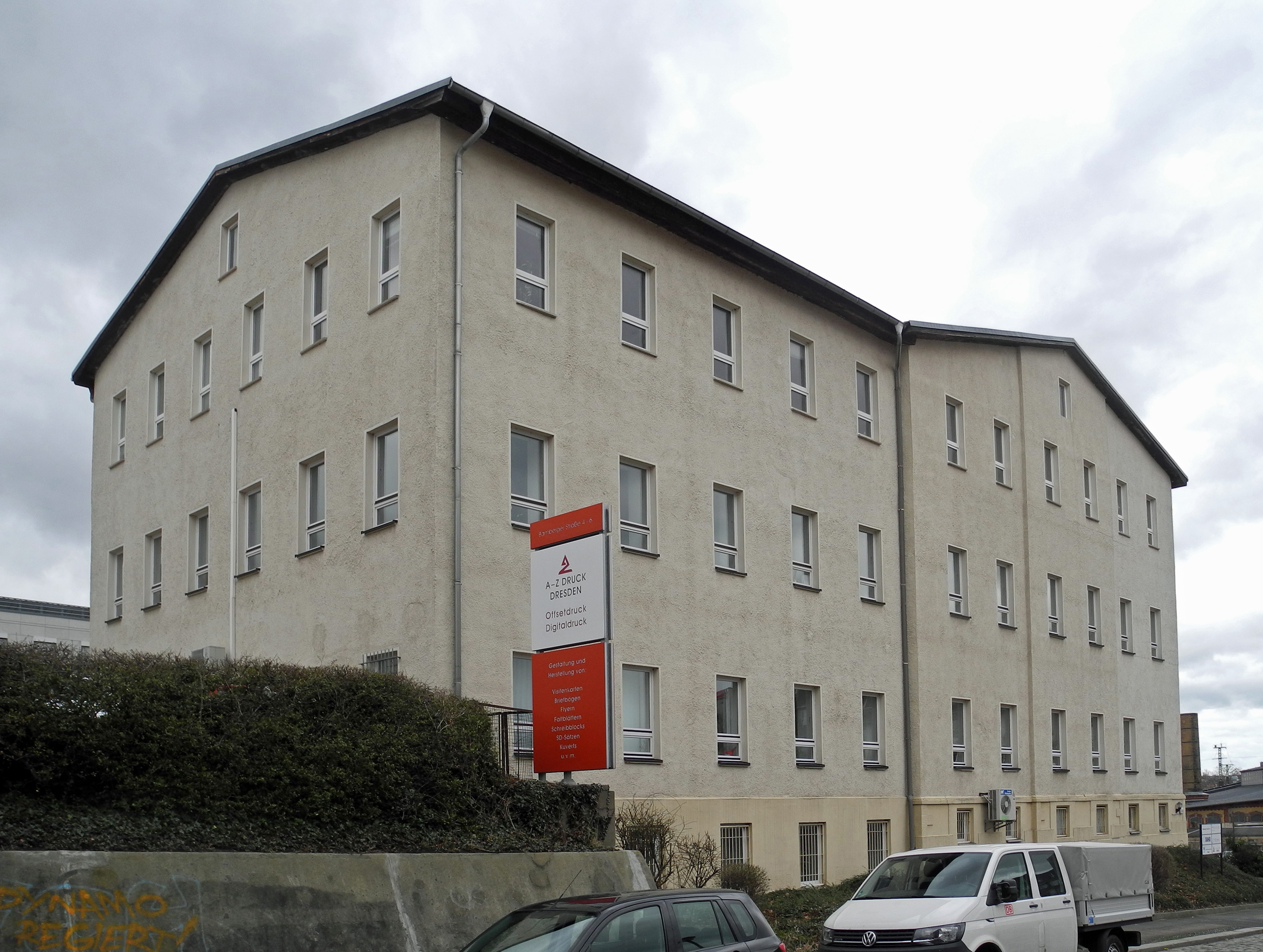 Firmengebäude in Dresden-Plauen, Bamberger Str. 4-6. Ehemals Firmensitz der Zigarettenfabrik A. M. Eckstein & Söhne, 1945 zerstört.